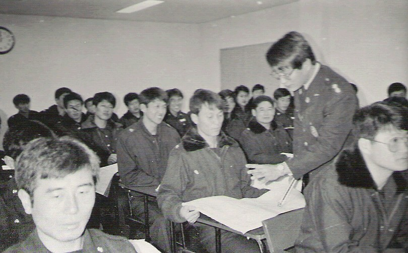 조종묵 등, 제6기 소방간부후보생 수업